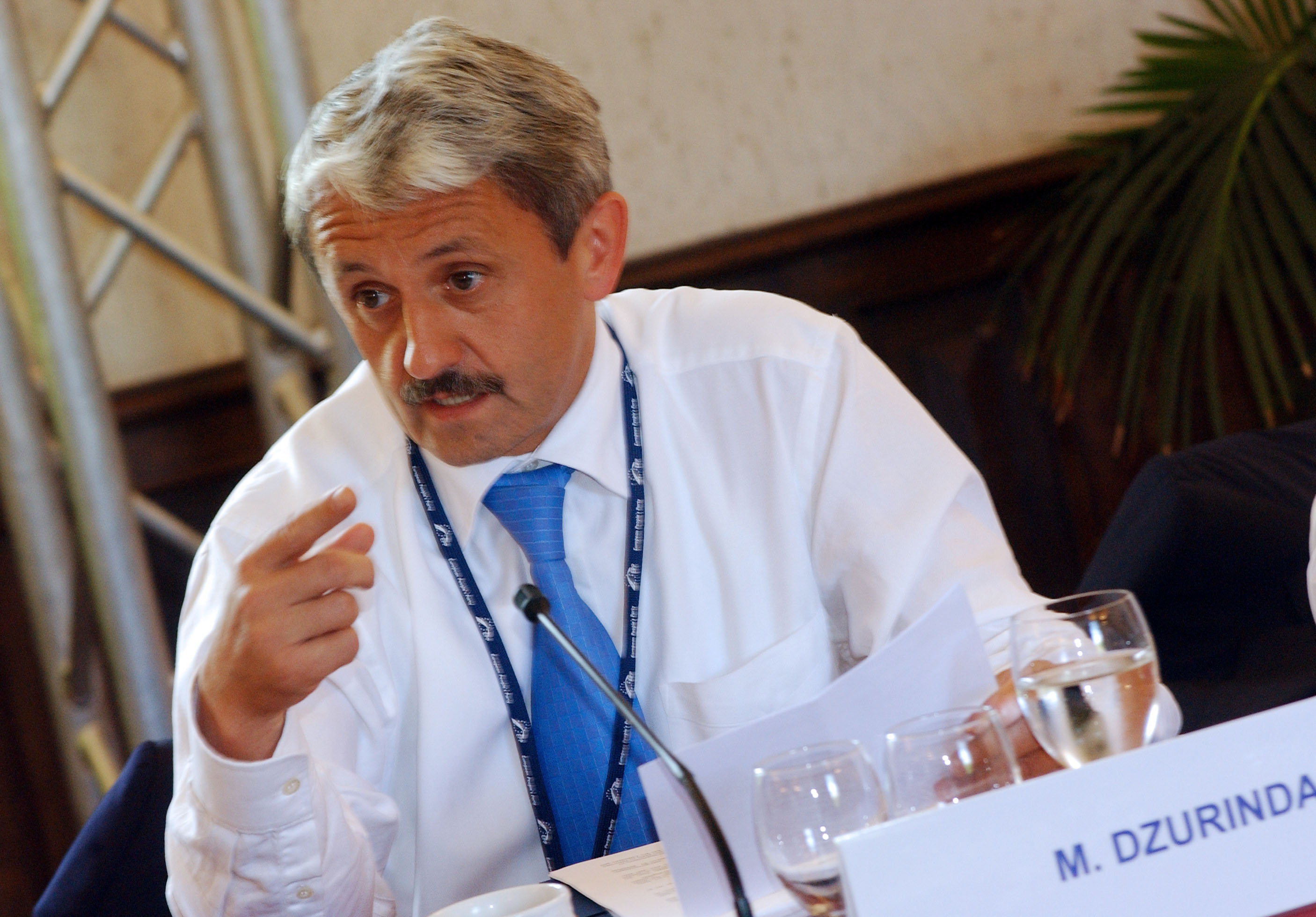 EPP Summit 16 June 2005